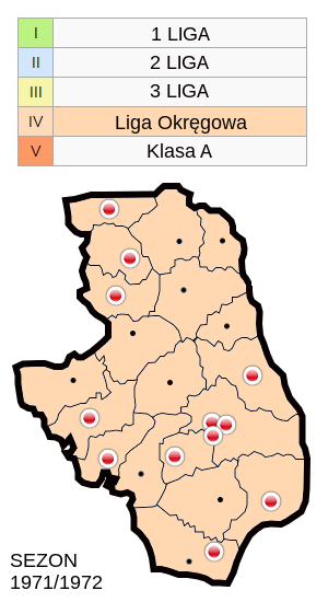 Jagiellonia w sezonie 1971/72- mapa klubów